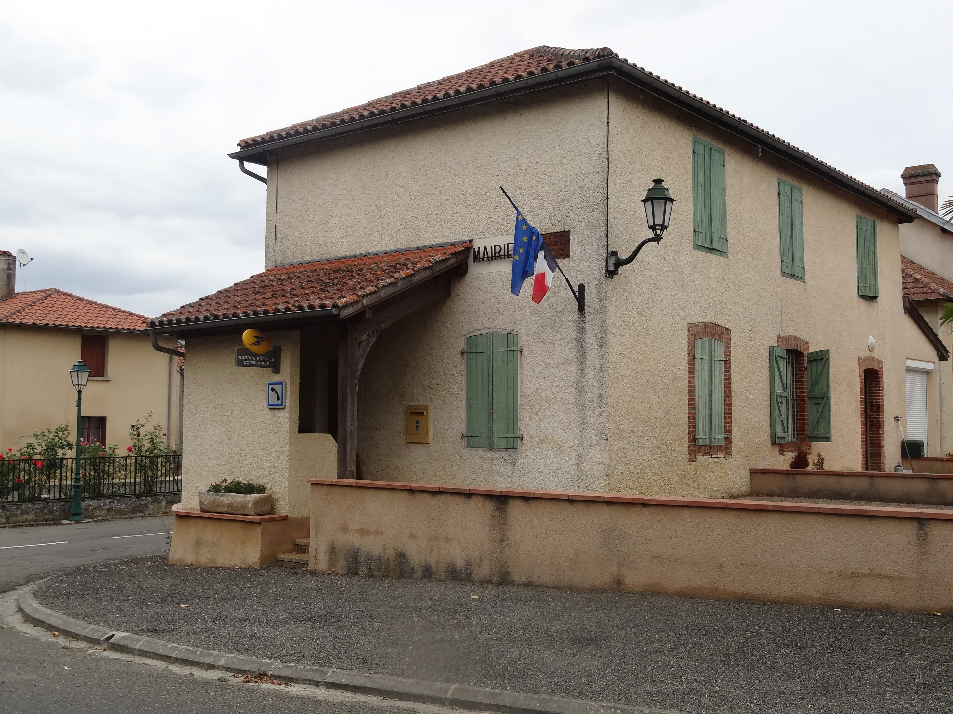 Mairie de Mont-de-Marrast.